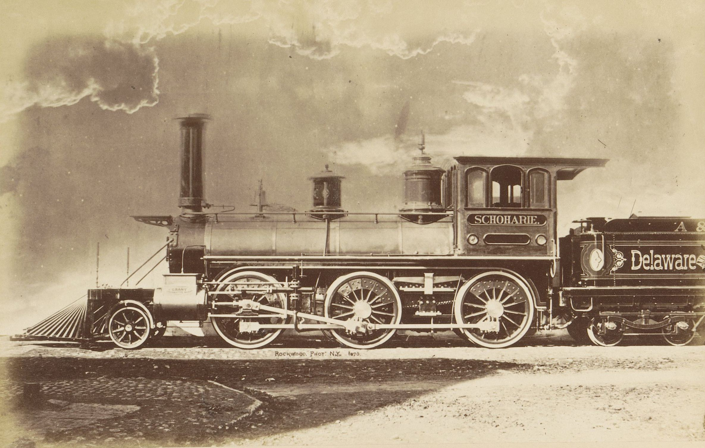 IdentificatieTitel(s): StoomlocomotiefObjecttype: foto bladzijde Objectnummer: RP-F-2001-7-1481-7VervaardigingVervaardiger: fotograaf: George Gardner Rockwood (vermeld op object)Plaats vervaardiging: New YorkDatering: 1870Materiaal: fotopapier Techniek: albuminedrukAfmetingen: foto: h 132 mm × b 211 mmOnderwerpWat: steam locomotiveVerwerving en rechtenCredit line: Aankoop met steun van de Mondriaan Stichting, het Prins Bernhard Cultuurfonds, het VSBfonds, het Paul Huf Fonds/Rijksmuseum Fonds en het Egbert KunstfondsVerwerving: aankoop 2001Copyright: Publiek domein